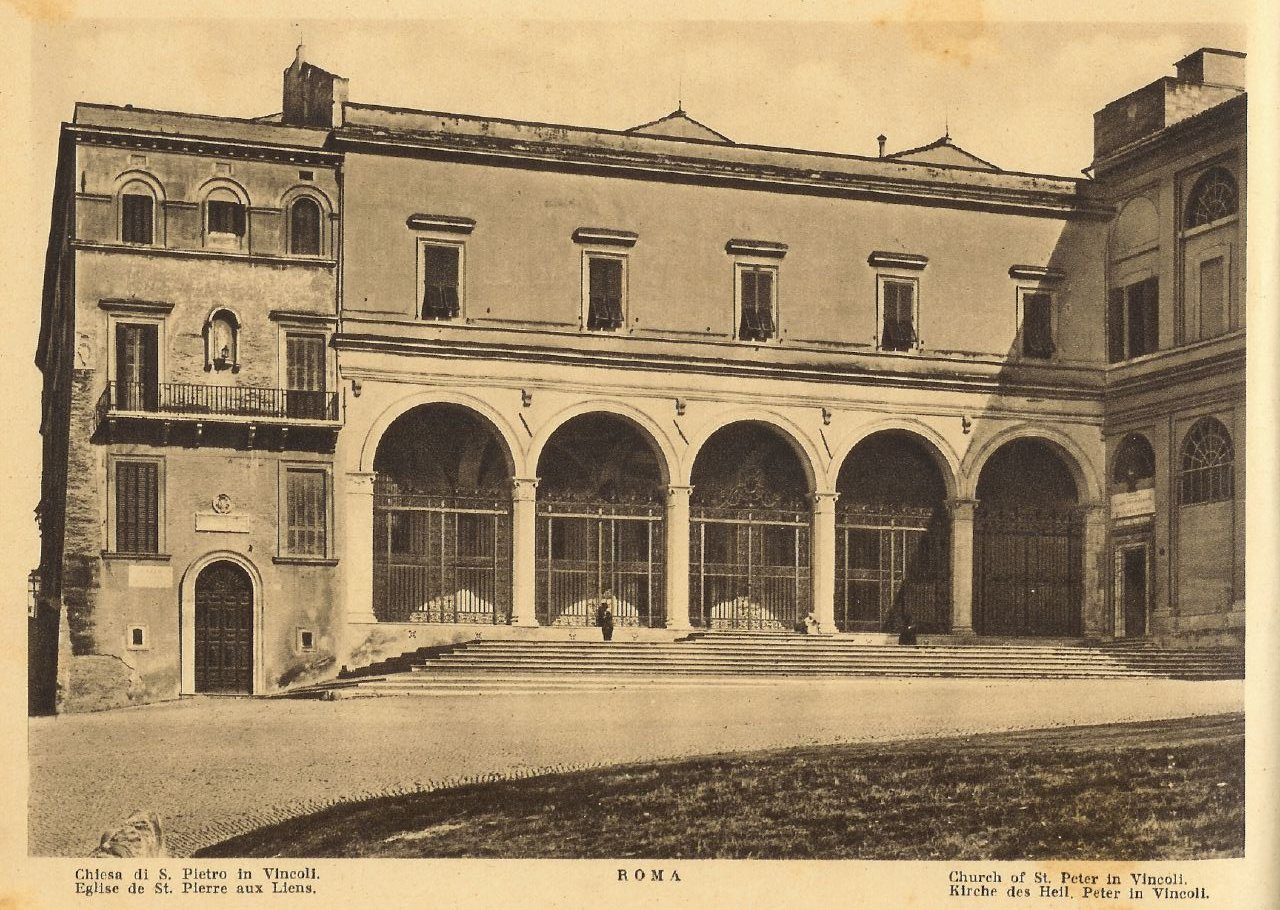 San Pietro in Vincoli (Rome)